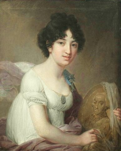 Волконская Софья Григорьевна (1786-1869), жена П.М.Волконского, сестра С. Г. Волконского.